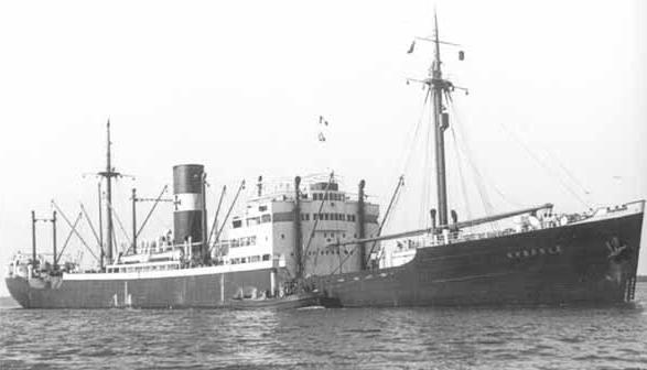 Das Frachtmotorschiff KYBFELS der DDG Hansa